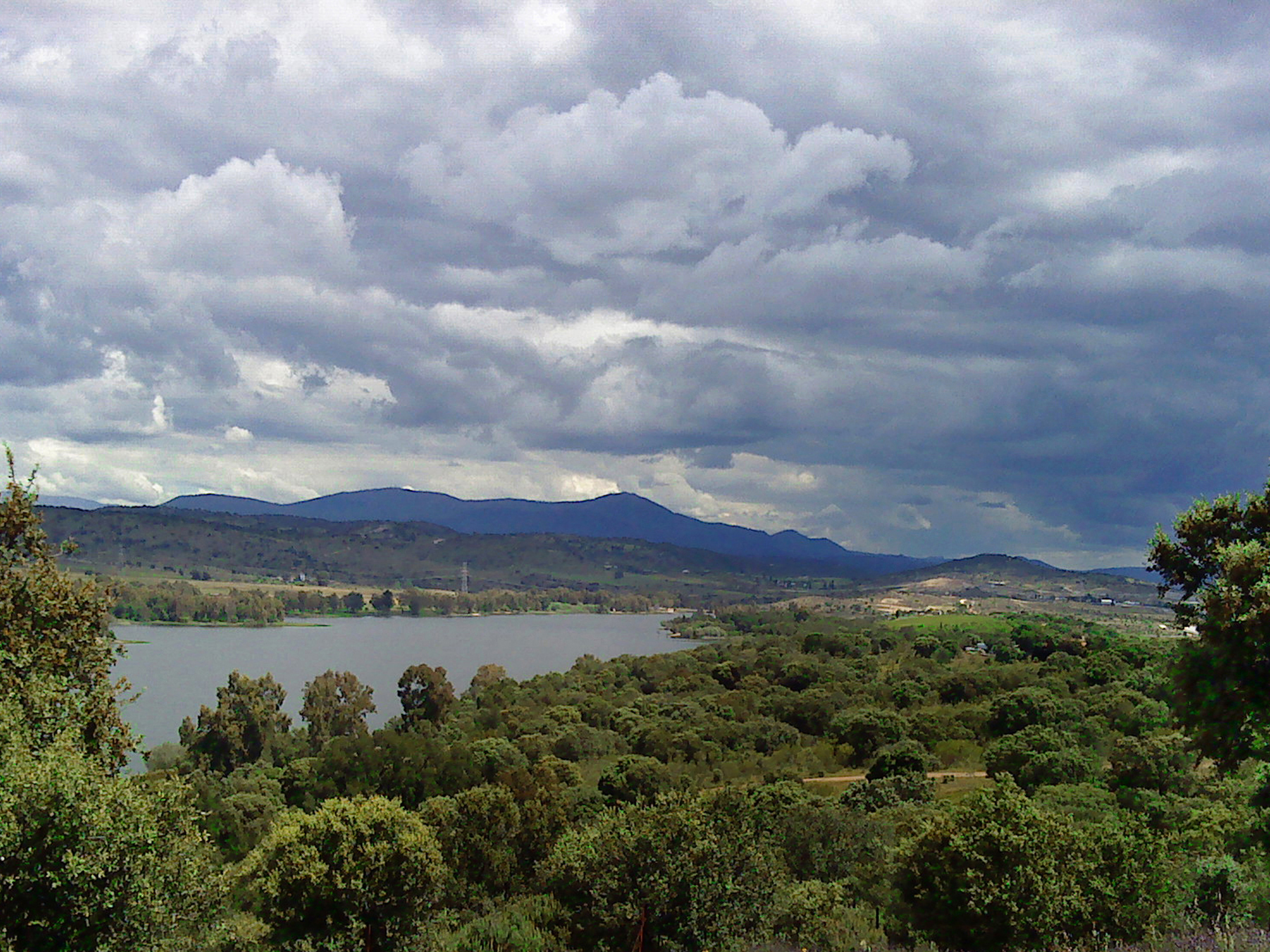 Embalse de La Portiña desde el cerro Santa Apolonia